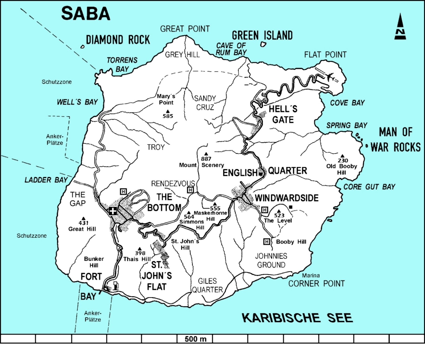 Karte von der Insel Saba